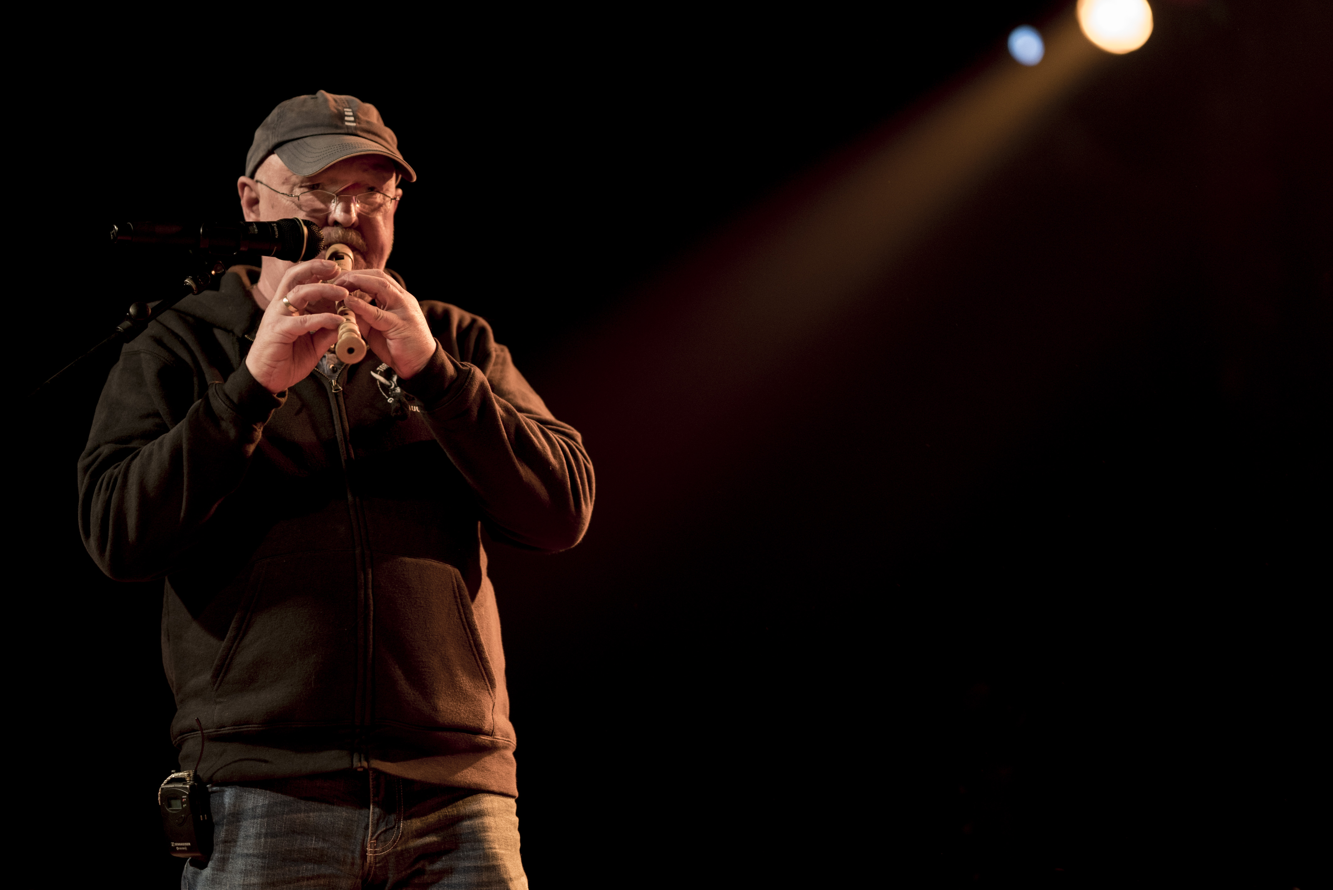 Klaus Büchner während eines Torfrock-Konzerts im Dezember 2017